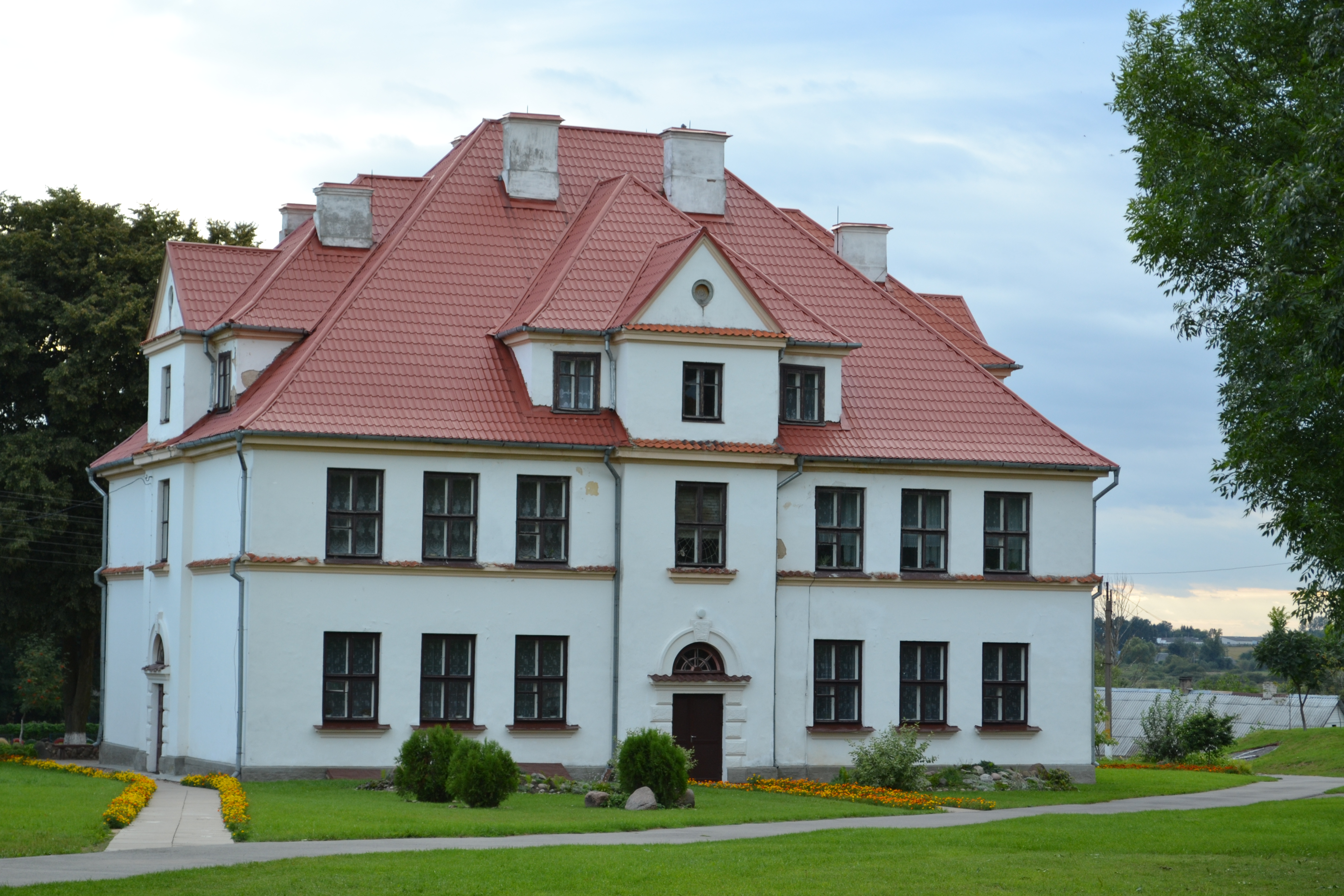 Беларуская (тарашкевіца): Будынак былой польскай школы. г. Камянец This is a photo of Belarusian heritage monument. Reference number: 113Г000322 ( WLM)